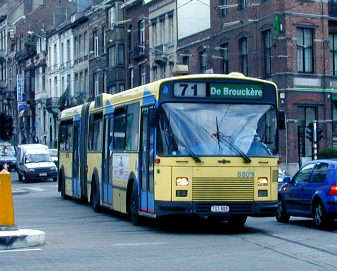 MIVB bus 8809 van het type Van Hool AG280/2 te Brussel.